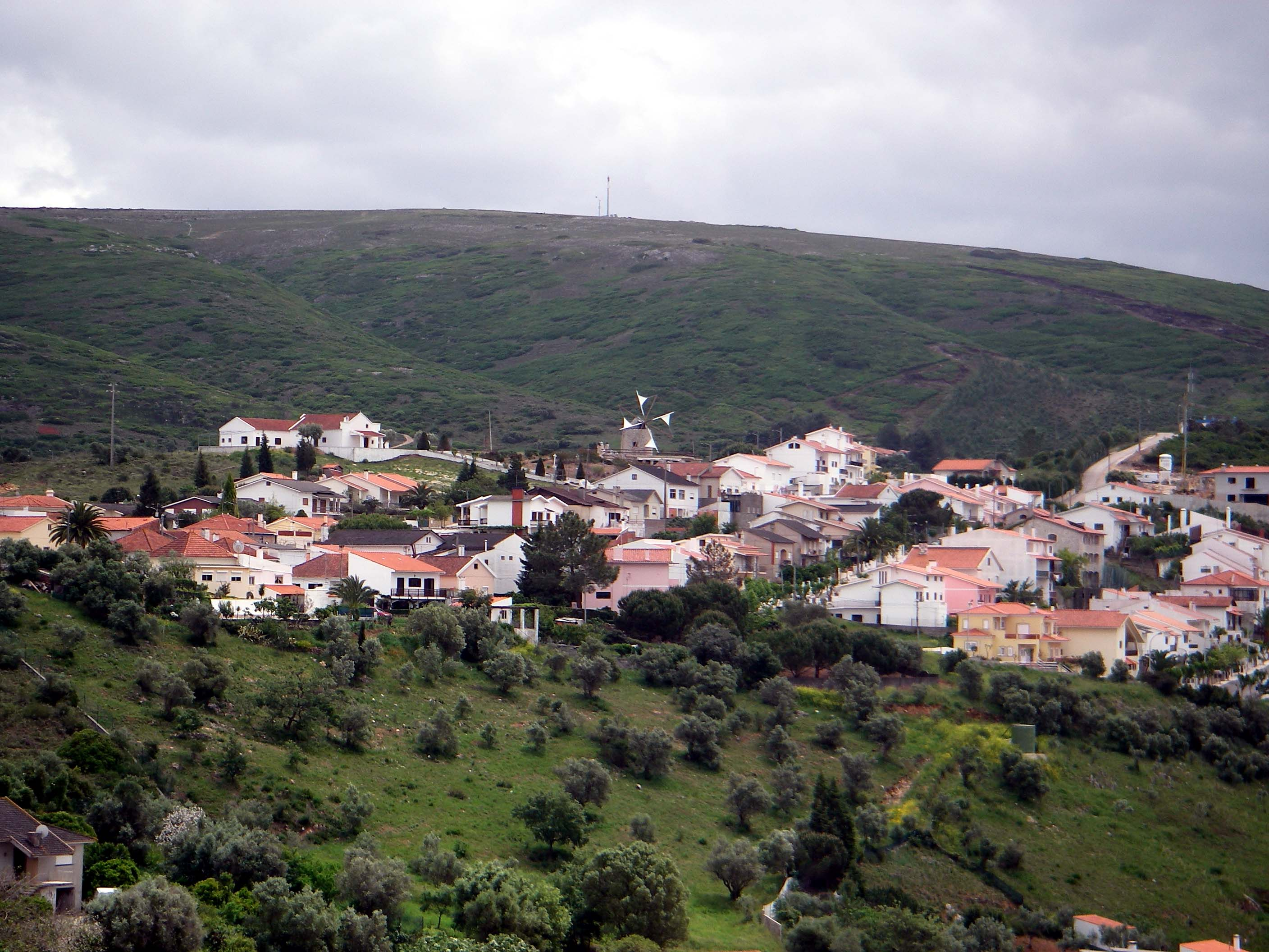 Porto de Mós (Castelo) This file was uploaded for Wiki Loves Monuments in Portugal with the unique identifier 69870.